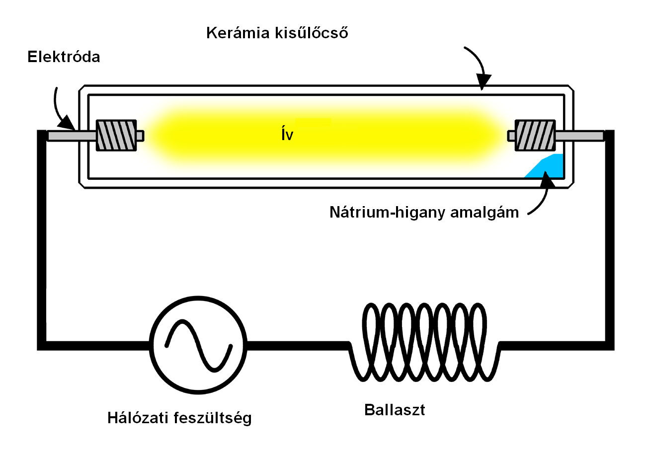 Nátriumlámpa működése